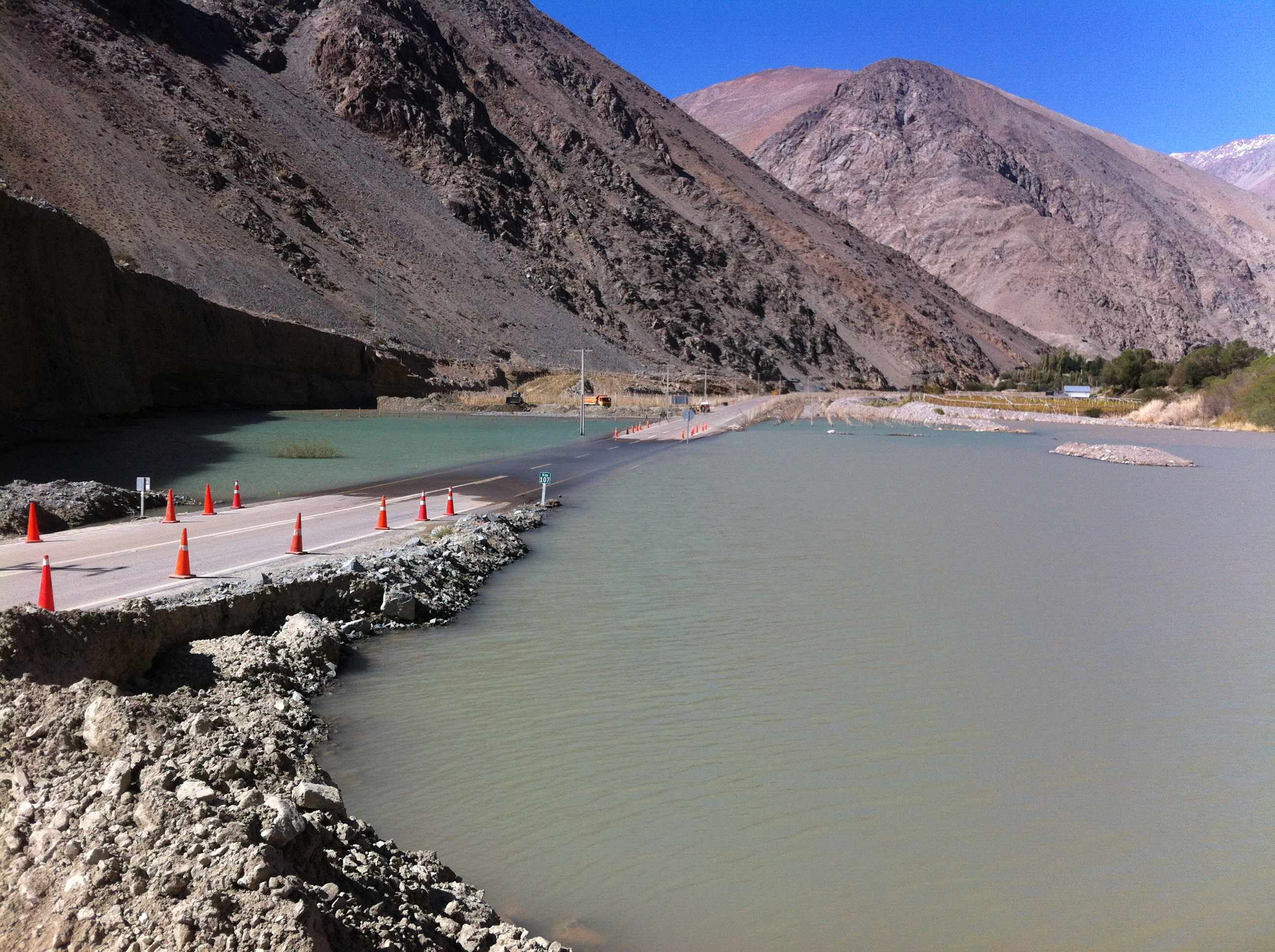 Ruta 41 en la comuna de Vicuña, cortada por el desborde del Río Turbio, afluente del Río Elqui.